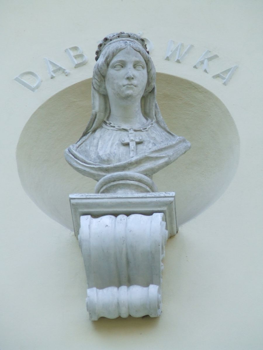 Pałac Juliana Ursyna Niemcewicza, obecnie rektorat SGGW, popiersie Dąbrówki na elewacji pałacu